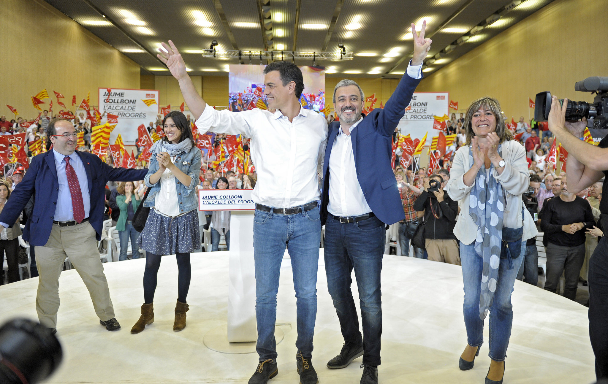 De izquierda a derecha: Miquel Iceta, Nuria Parlón, Pedro Sánchez Pérez-Castejón, Jaume Collboni y Nuria Marín en un acto del Partido de los Socialistas de Cataluña en Barcelona el 19 de mayo de 2015.